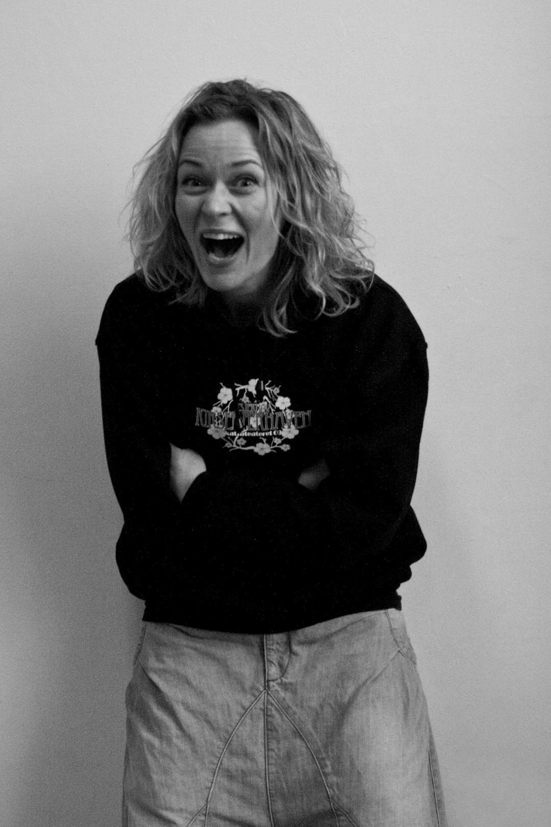 Line Verndal, Kattateateret’09 (1007)